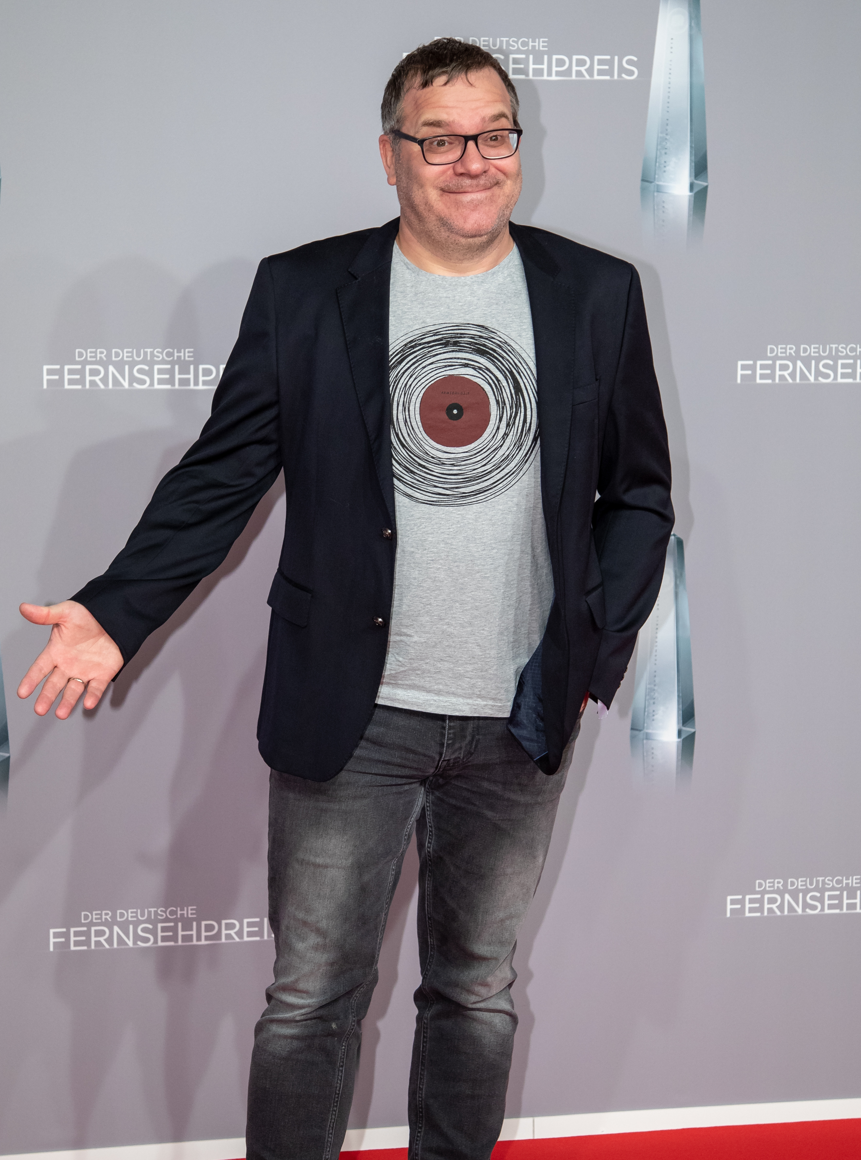 Elton beim Deutschen Fernsehpreis 2019 in der Düsseldorfer Rheinterrasse